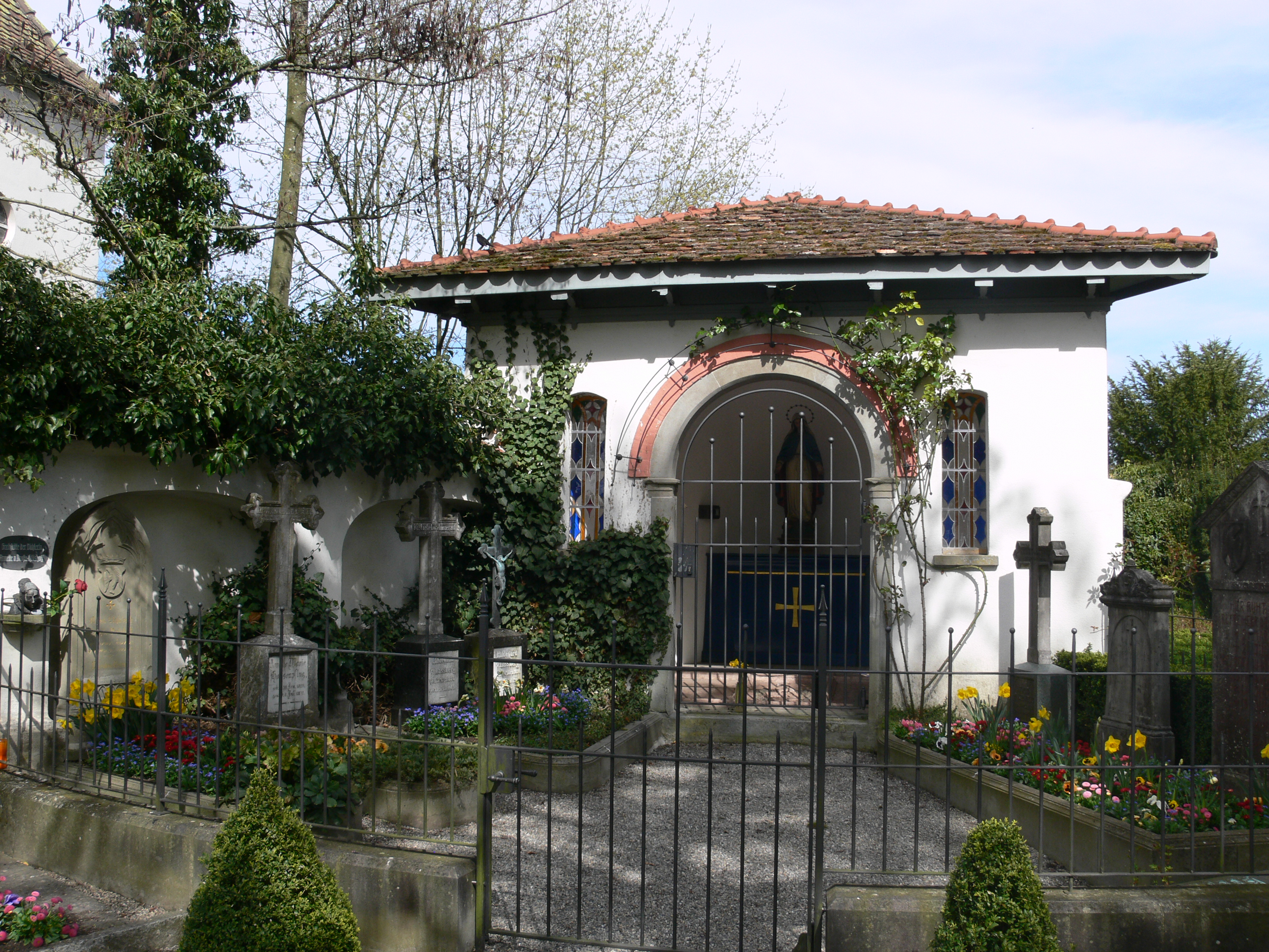 Friedhof in Meersburg (Bodenseekreis) Grabstätte Joseph von Laßberg